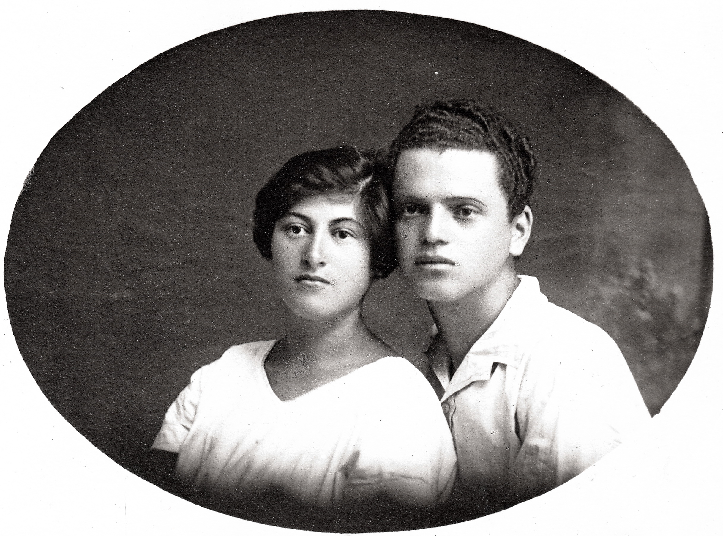 זאב און ויונה בודינגר בירושלים, ב-15 ביוני 1924